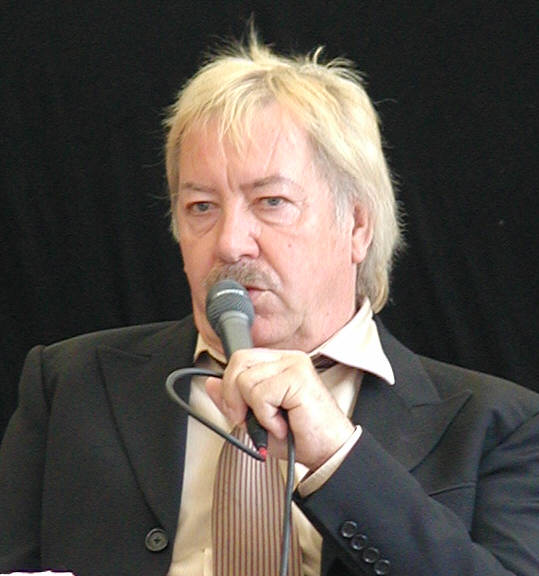 Werner Böhm alias Gottfied Wendehals